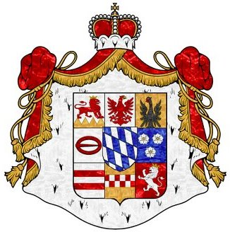 Wappen des Fürstentums Löwenstein-Wertheim-Rosenberg, aufgelöst 1806.